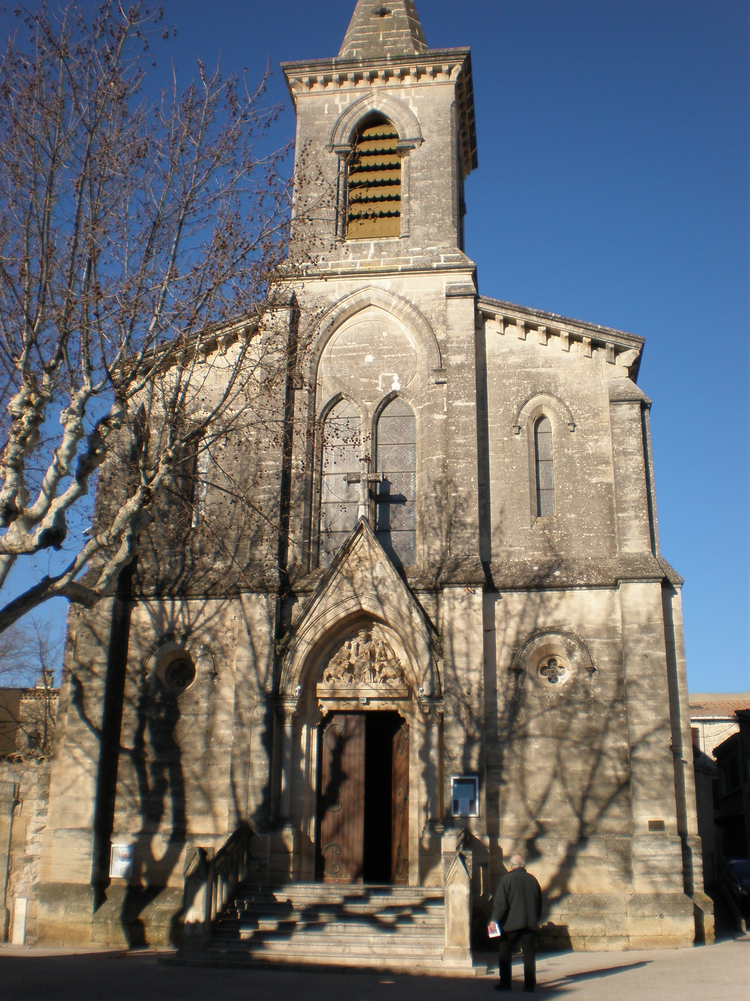 Église Saint-Julien et Saint-Basilisse de Grabels (Hérault, France)